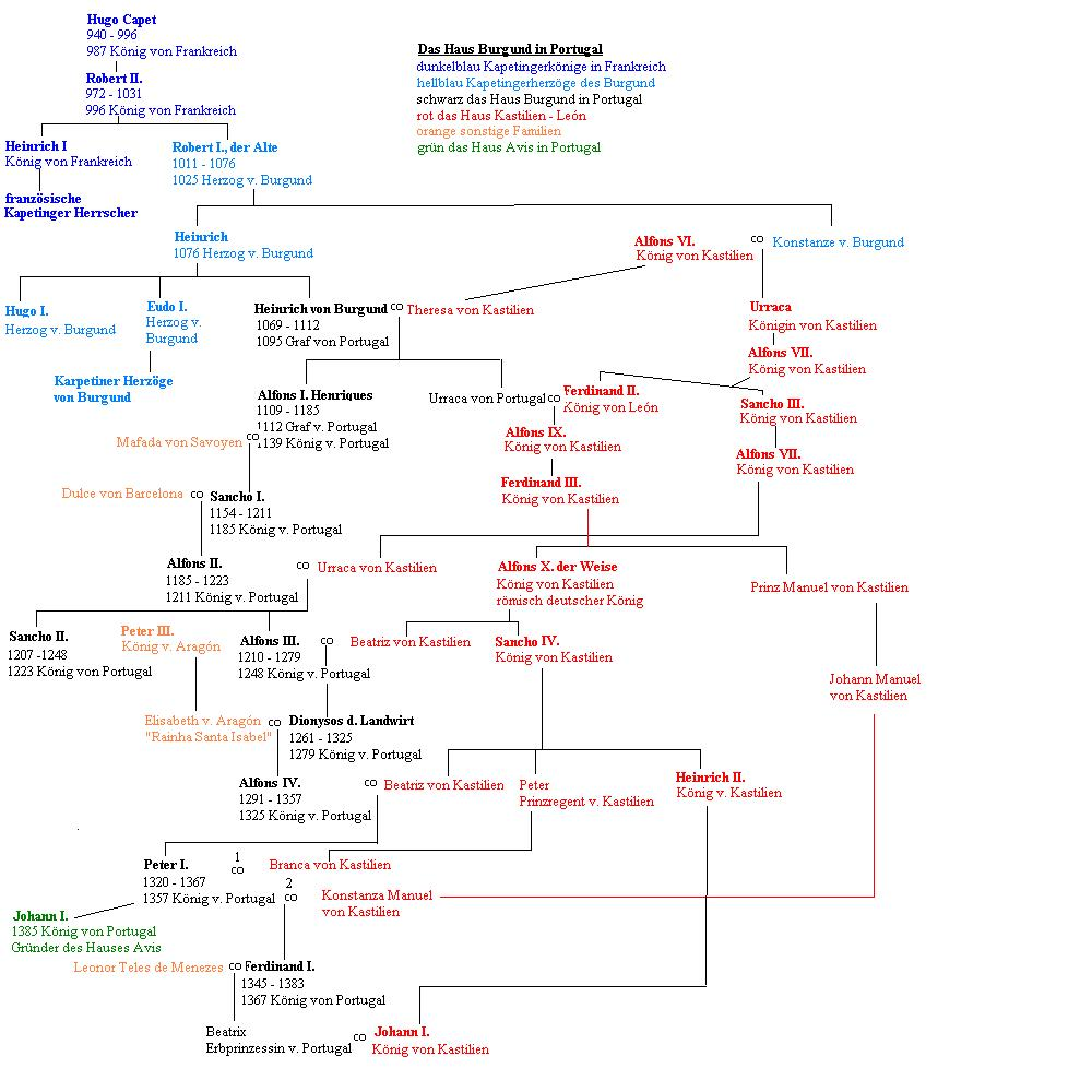 Stammbaum der Burgunder Könige in Portugal